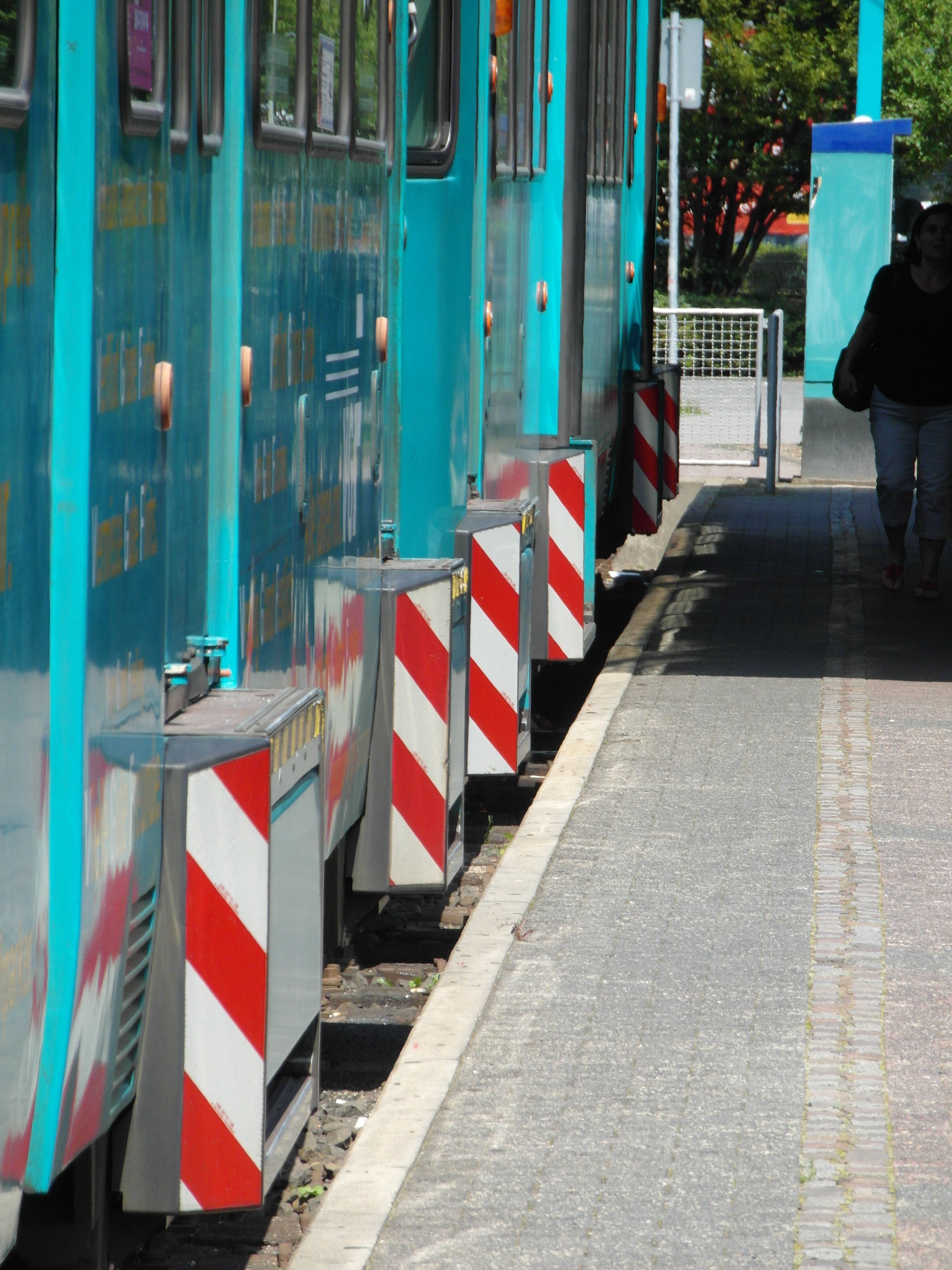 Stadtbahn Frankfurt am Main - Linie U5